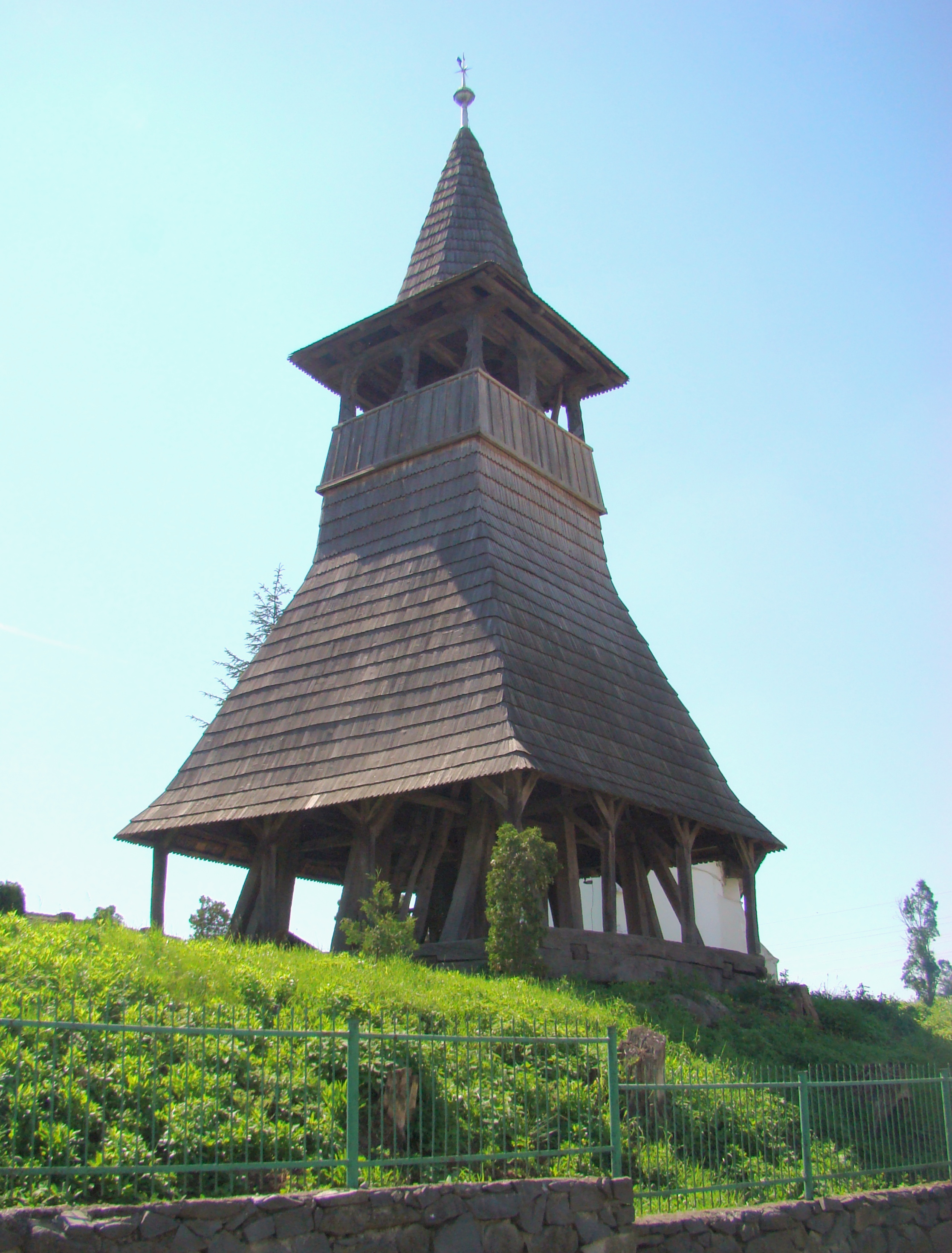 Clopotniță din lemn, sat Agrișteu; comuna Bălăușeri, judeţul Mureş 02